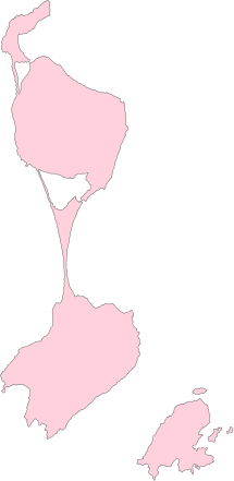 Résultats des élections législatives de Saint-Pierre-et-Miquelon en 2012